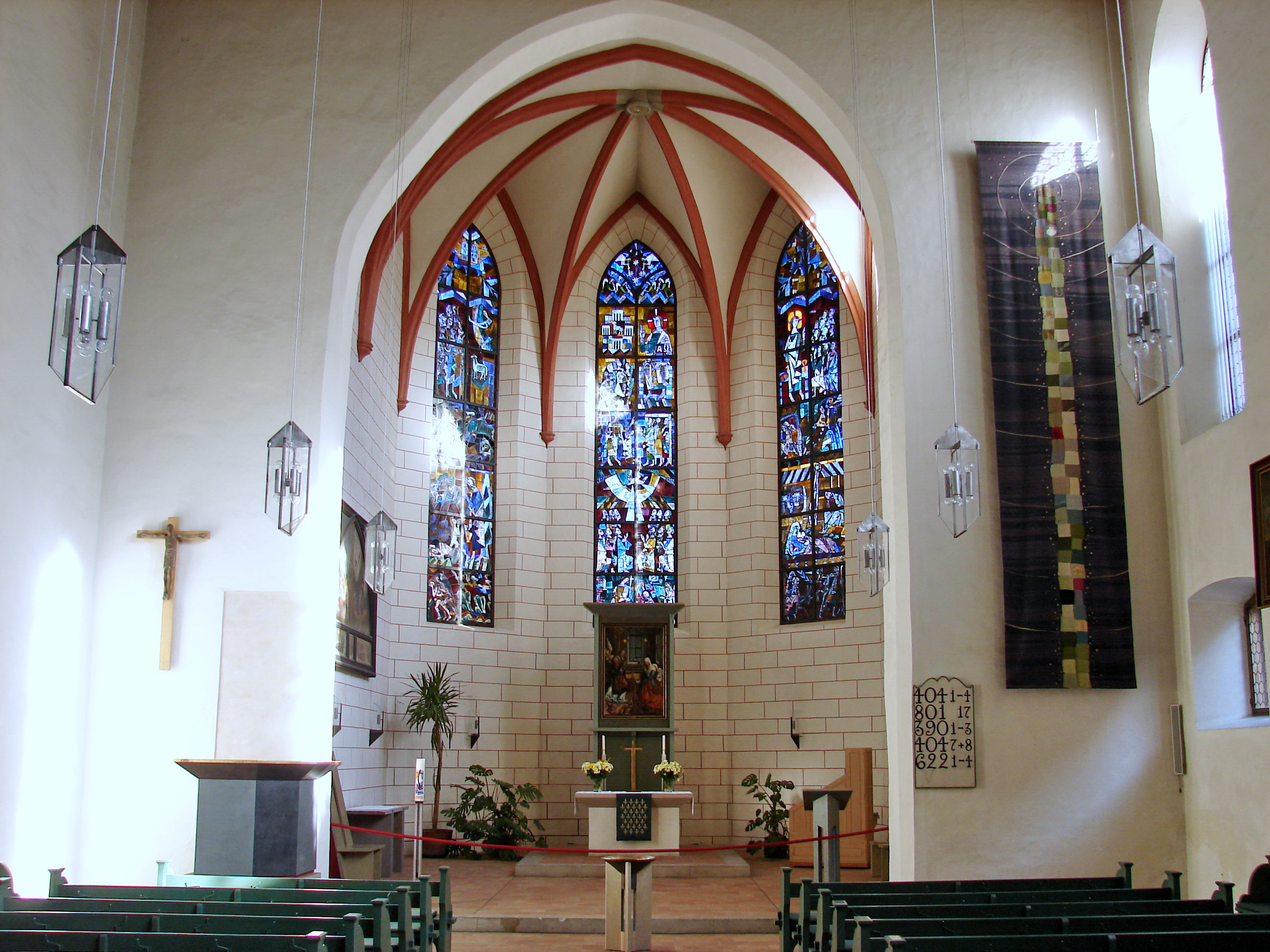 Die Kirche St. Jakob in Augsburg, auch Jakobskirche genannt, ist eine evangelische Kirche in Augsburg.